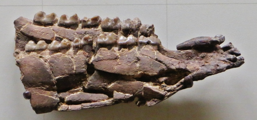 Fossil of Palaeotapirus- Took the picture at Museum am Lowentor, Stuttgart